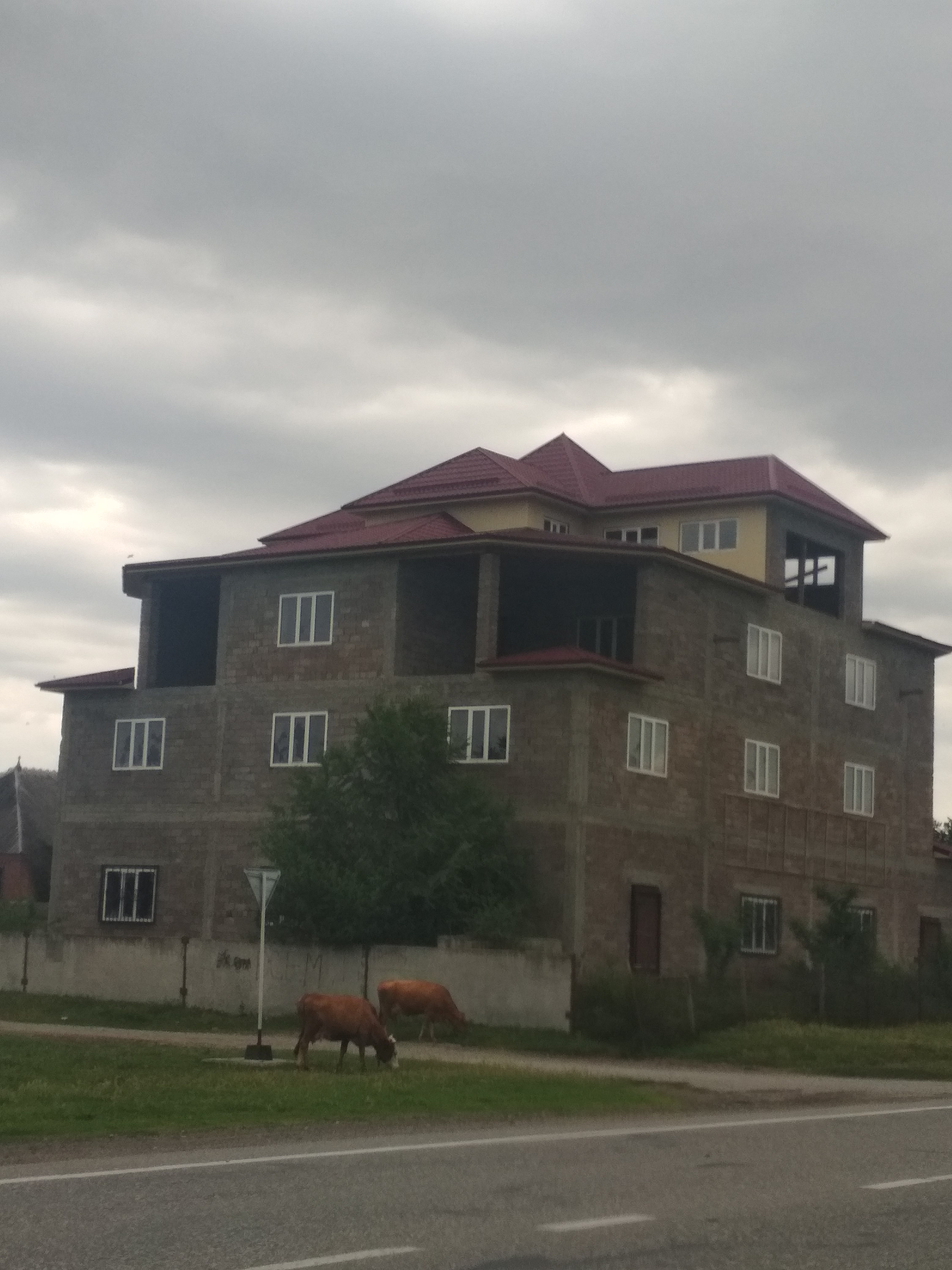 Нохчийн: ОьрзагӀалара цӀа